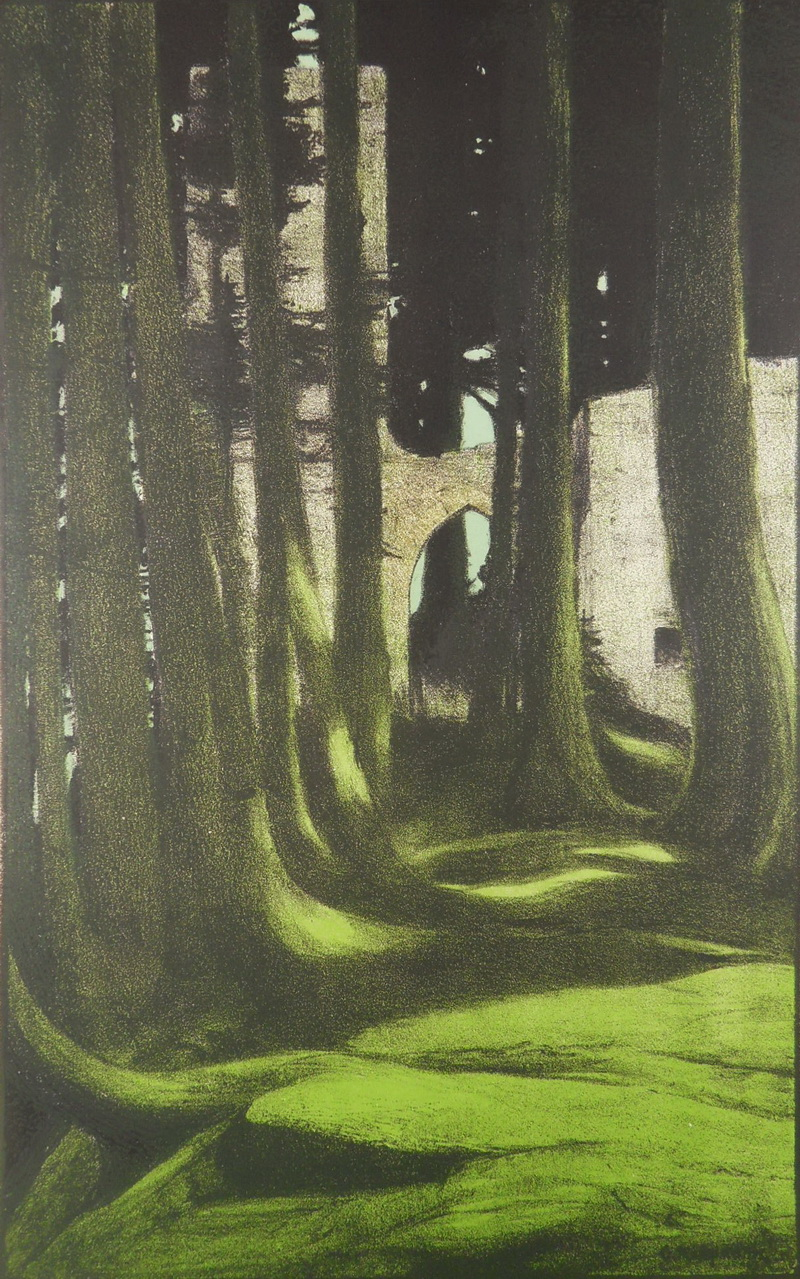 Ruine im Wald - Lithografie